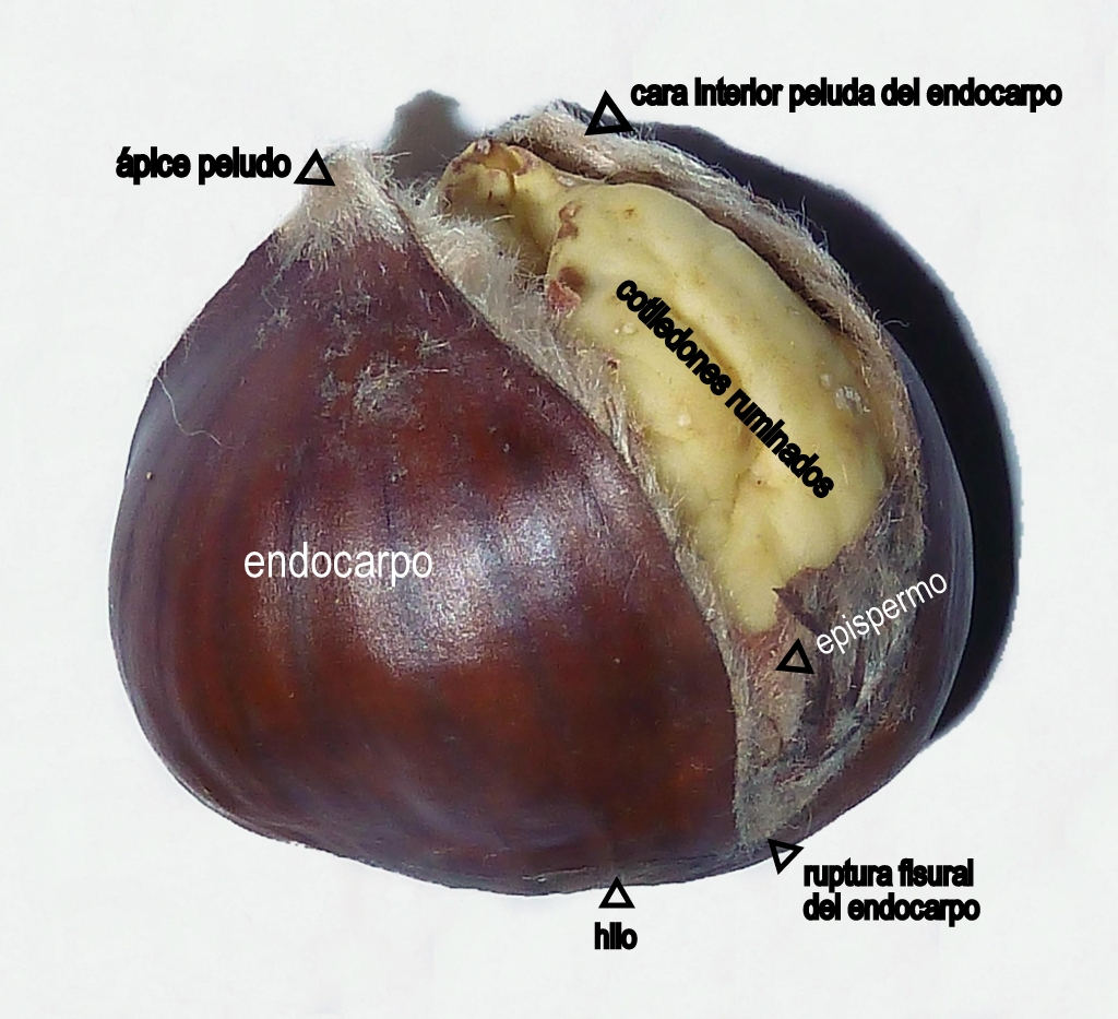 Castanea sativa (Castaño) : Anatomía de un aquenio en parte abierto; la semilla visible en el interior del endocarpo es la parte comestible. - Comercio, Madrid (España).